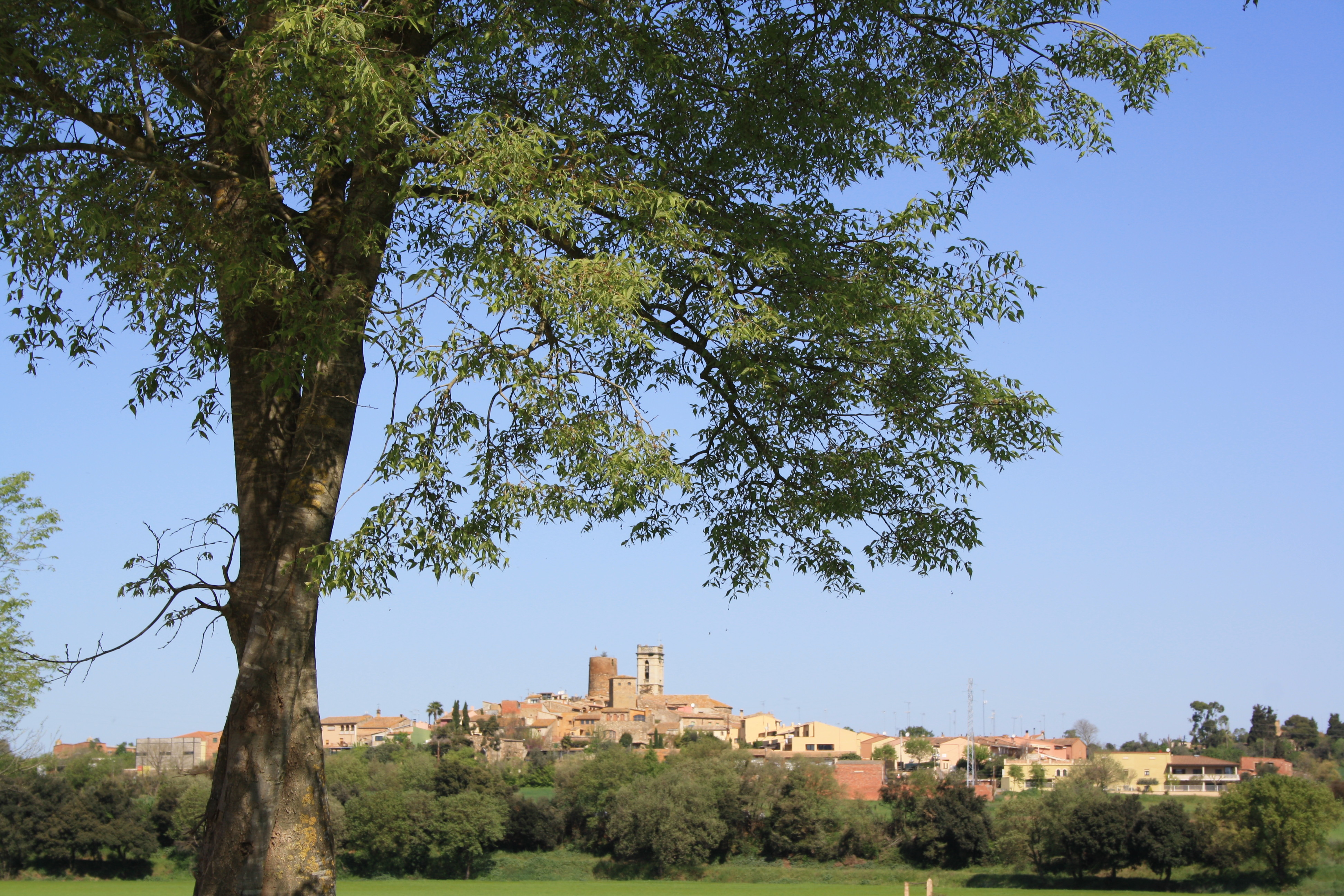 Vista general de Cruïlles, 9 d'abril de 2011